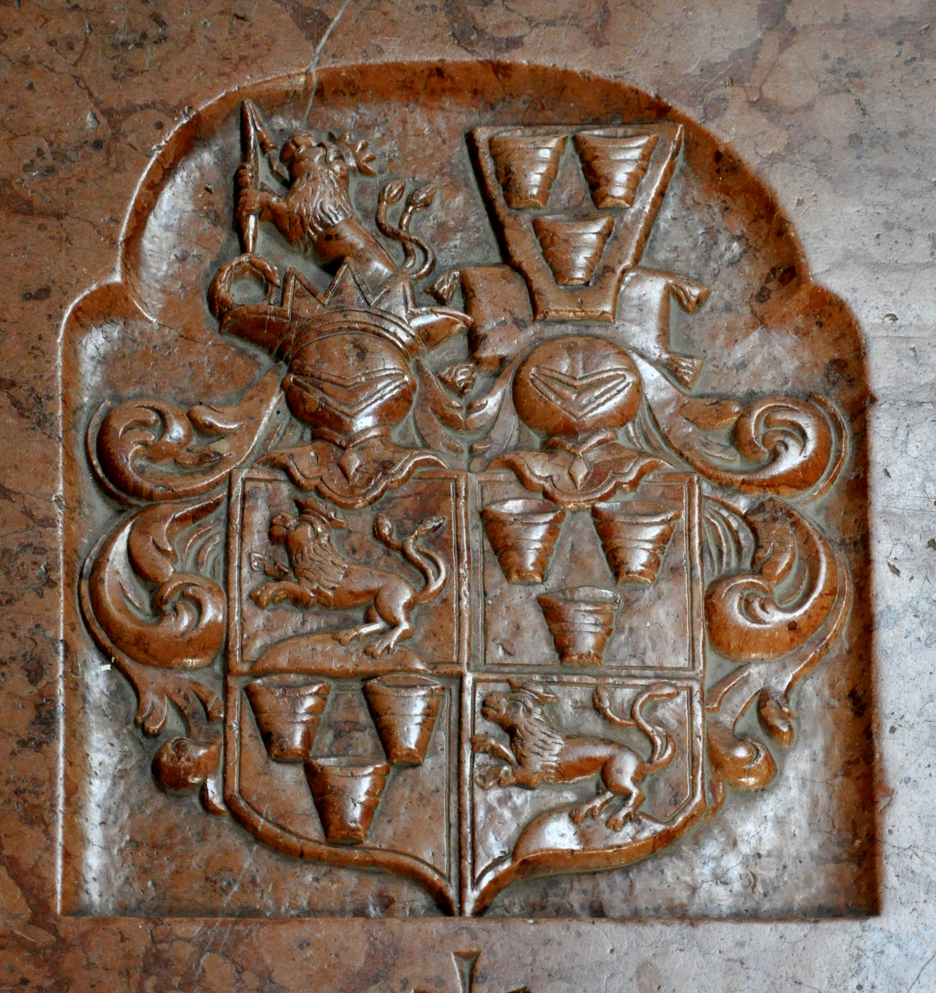 Stiftskirche Reichersberg, Oberösterreich Gruftplatte des Franz Joseph Adolph Reichsgraf von Ahamb zu Neuhaus und Geinberg († 1756). Familienwappen der Grafen von Ahamb